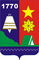 Герб Валдая 1977 года, Новгородская область